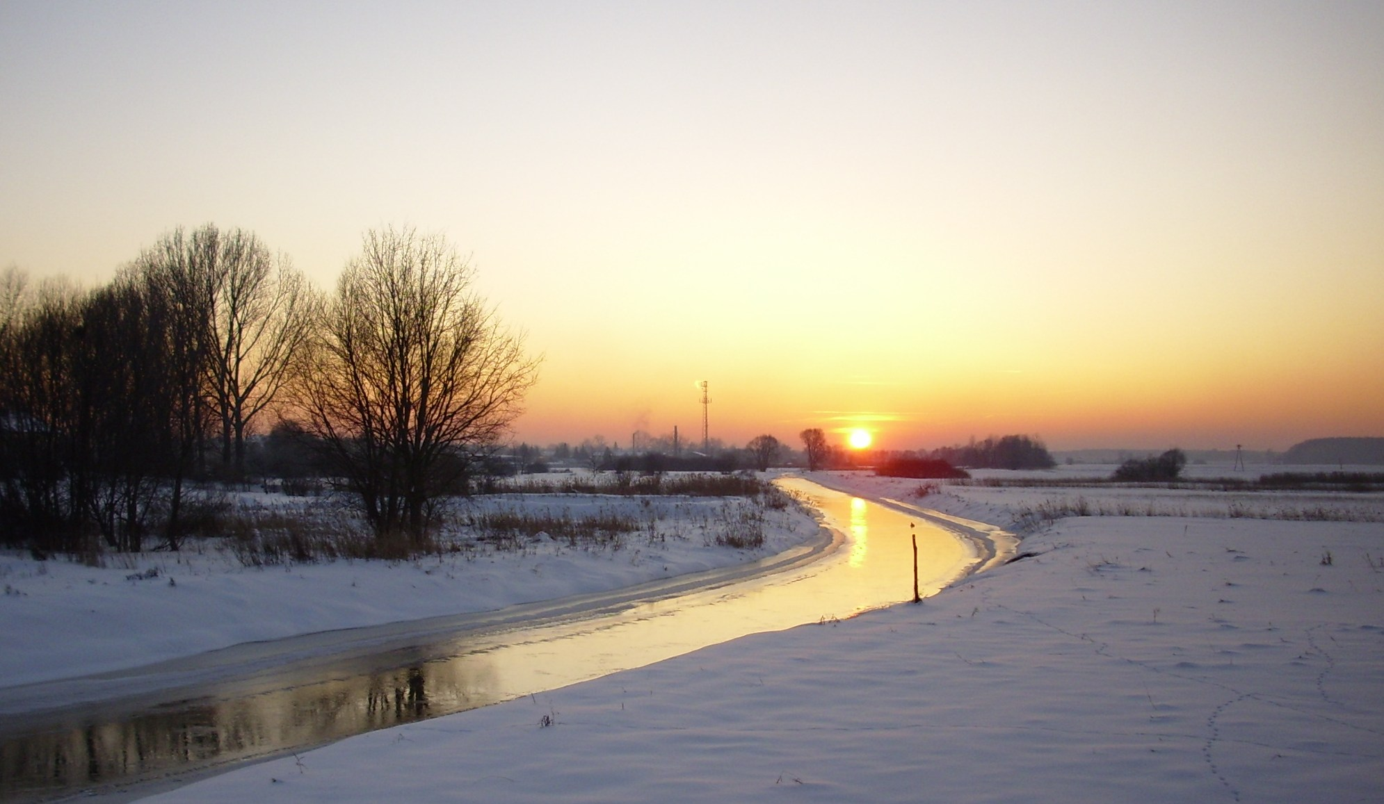 Międzyrzec Podlaski. Zimowy zachód słońca nad Krzną.